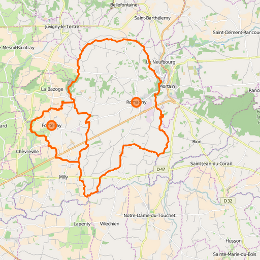 Carte de la commune nouvelle et ses communes déléguées